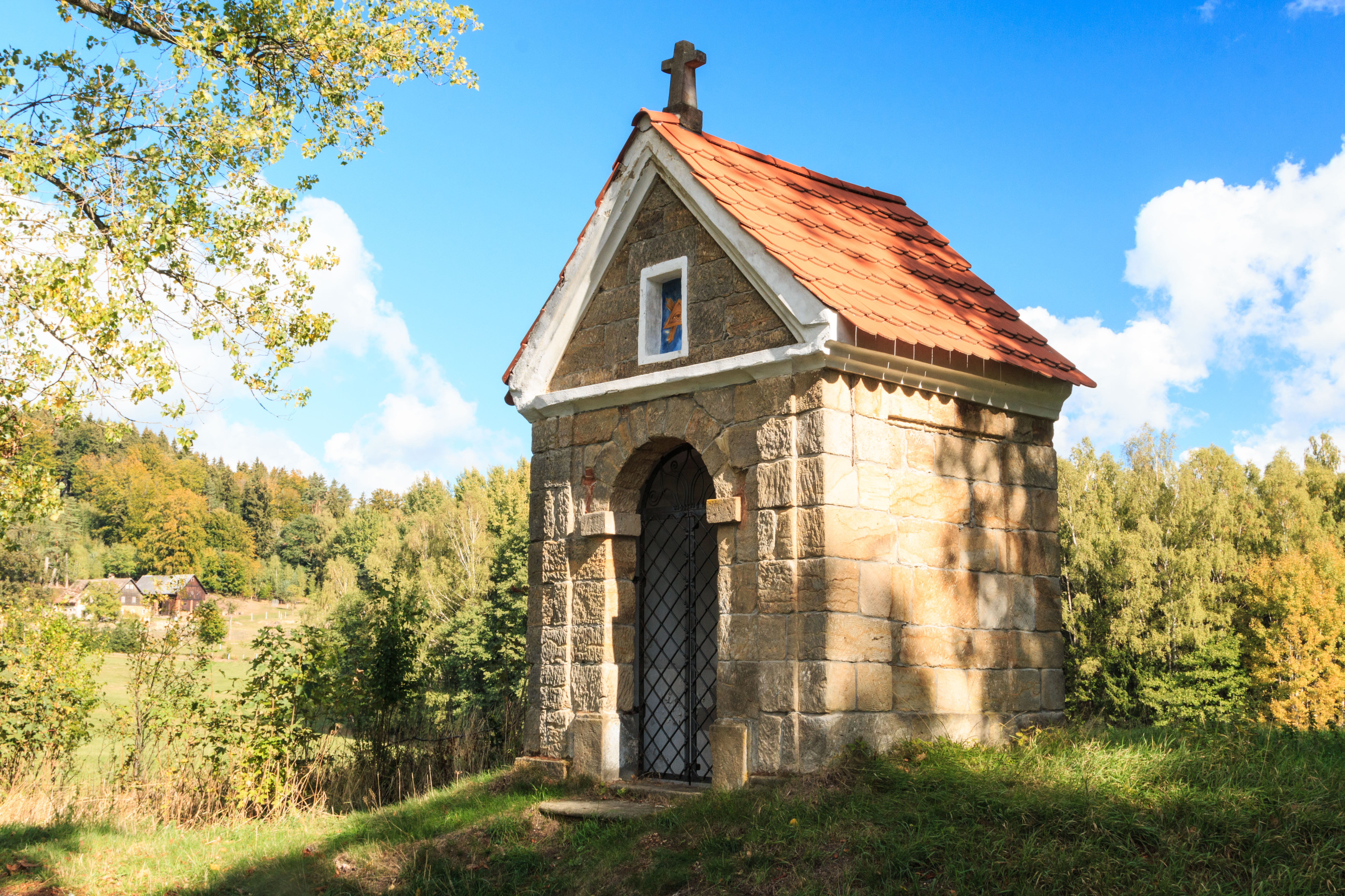 Kaple nad Mařenicemi Project: Vodstvo.